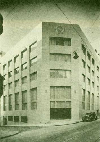 Fachada de la filial del Banco Holandés Unido en Buenos Aires, Argentina. Obra del arquitecto Antonio U. Vilar y de Franz Meyer. Calle 25 de Mayo 81. Barrio de San Nicolás.